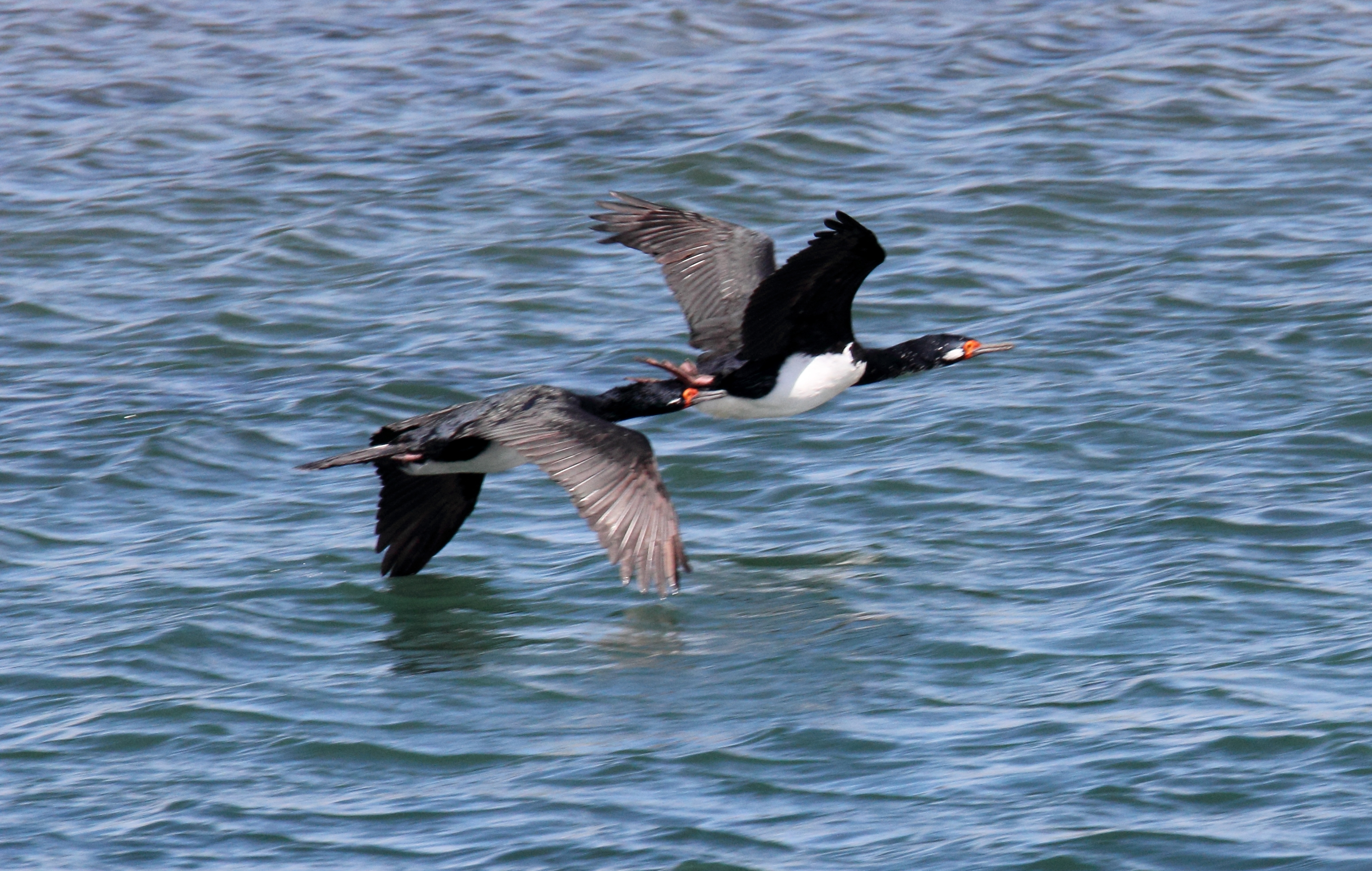 Magellantic Cormorant (Phalacrocrax magellanicus)